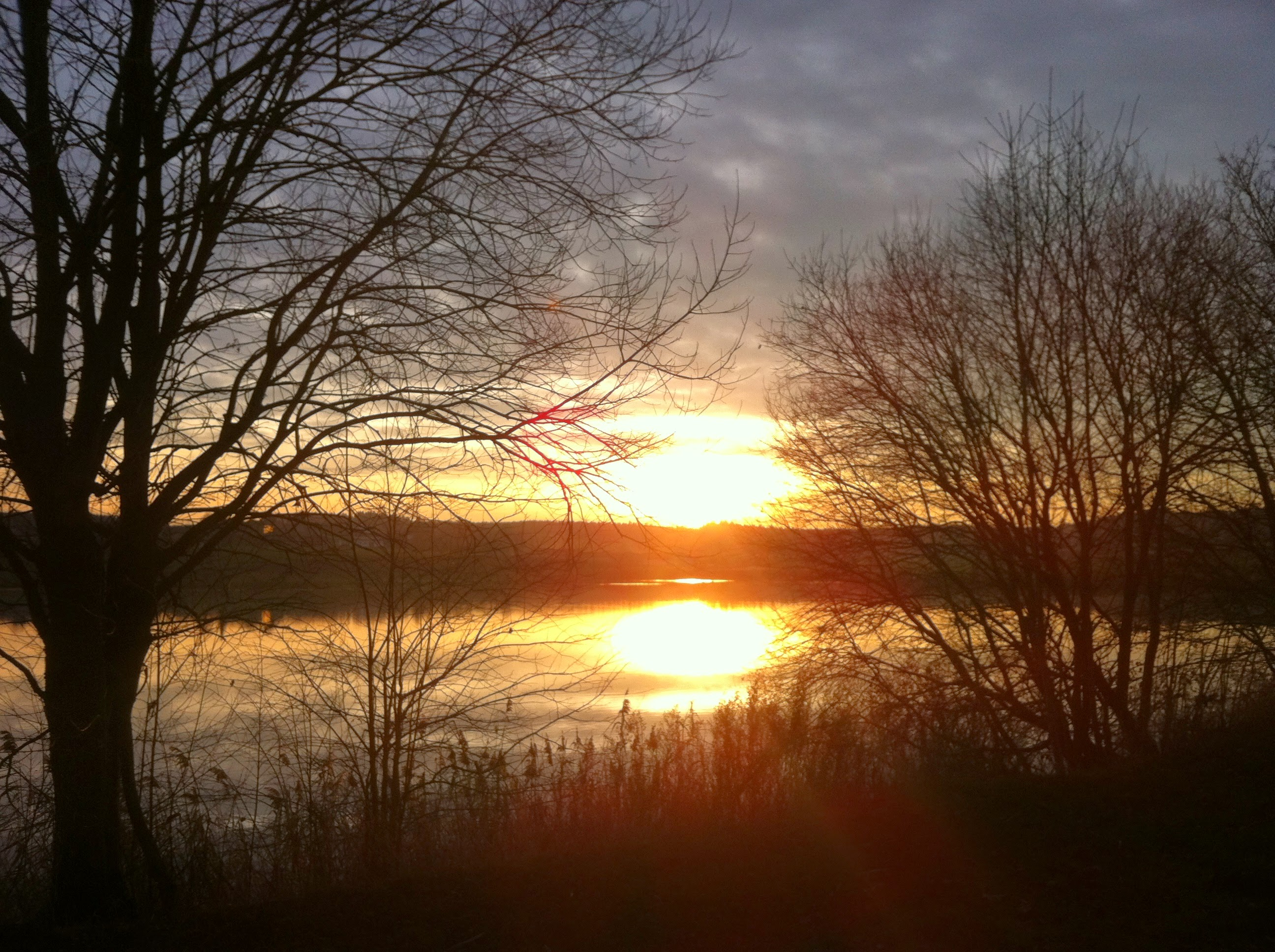 Deutschland (D) - Baden-Württemberg (BW) - Landkreis Sigmaringen (SIG) - Gemeinde Ostrach: Lausheimer Weiher